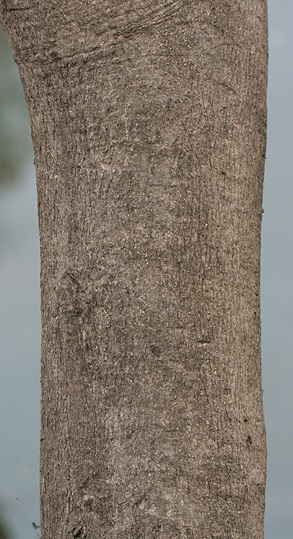 Gamhar or Kashmir Teak Gmelina arborea in Kolkata, West Bengal, India.